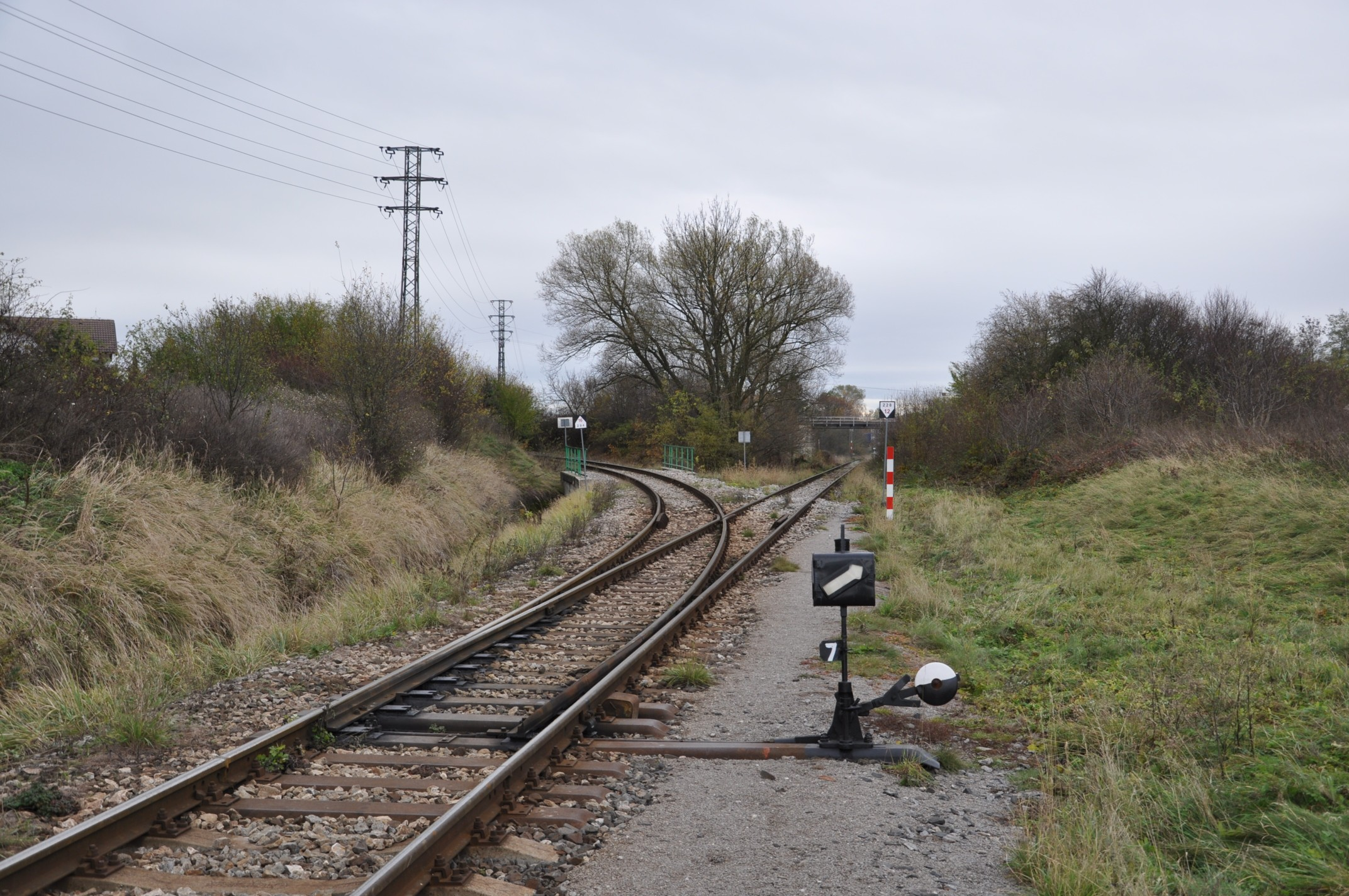 Bahnhof Hořelice der ehemaligen Kladno-Nučicer Bahn